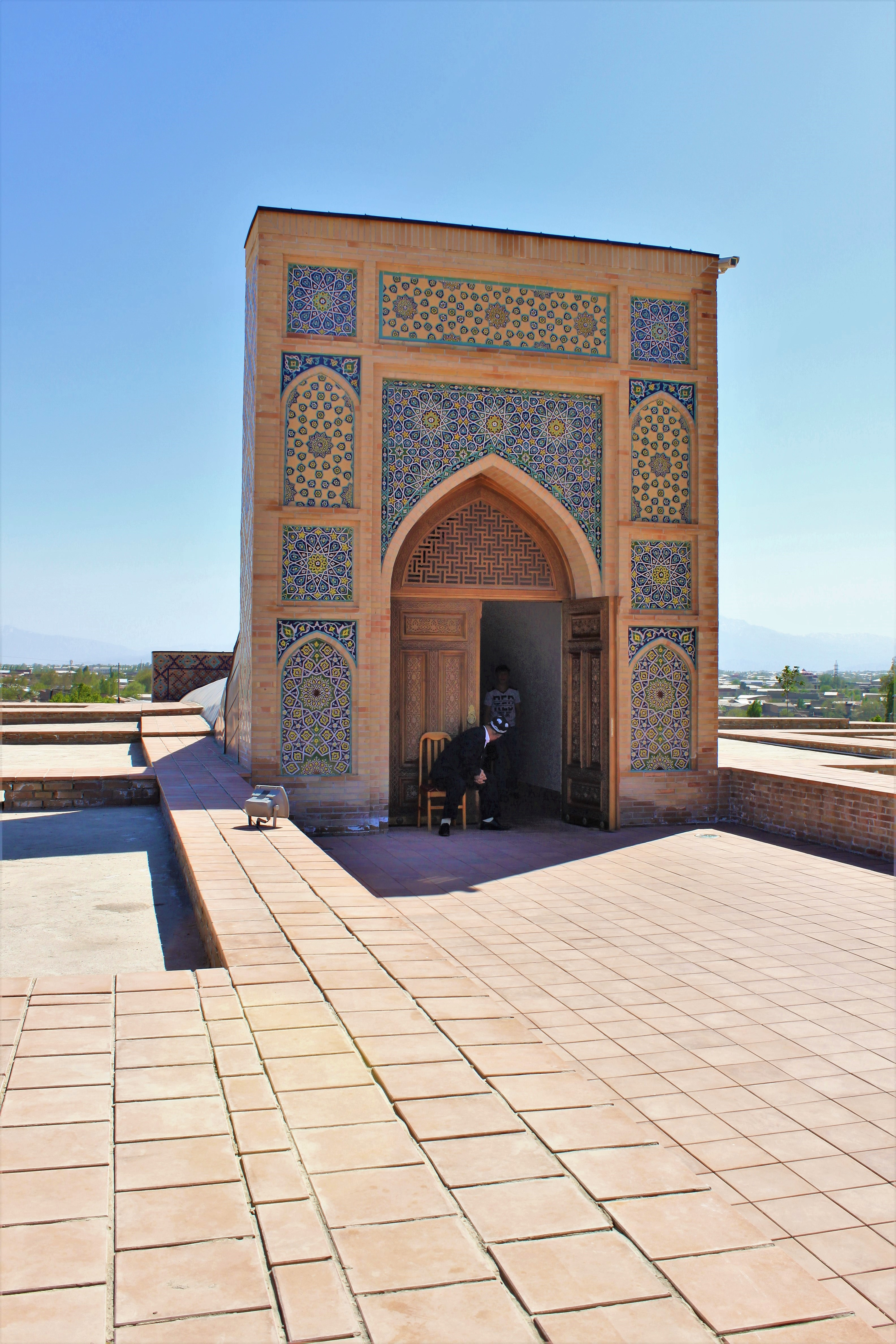 Entrée de l'observatoire